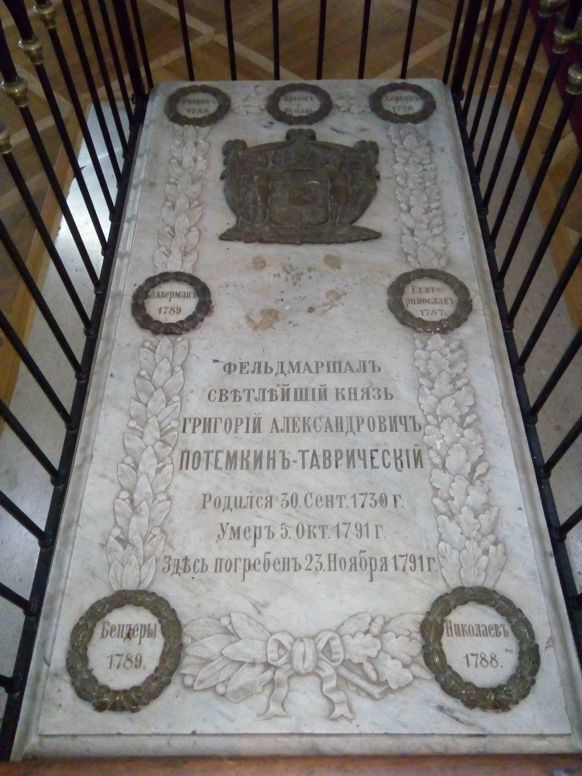 Могила Григорія Потьомкіна